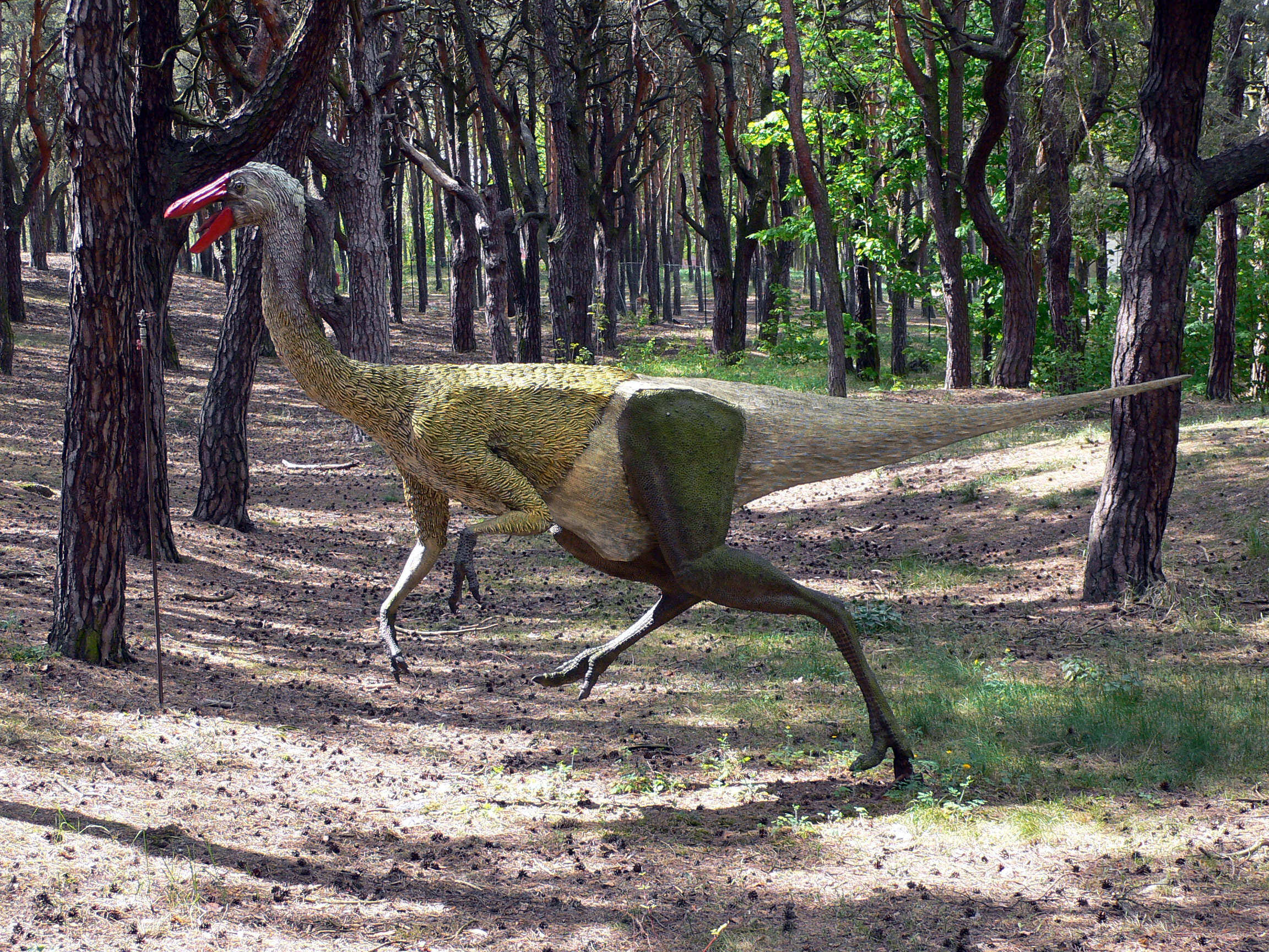 JuraPark, Solec Kujawski.